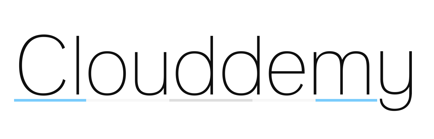 Logotipo de Clouddemy